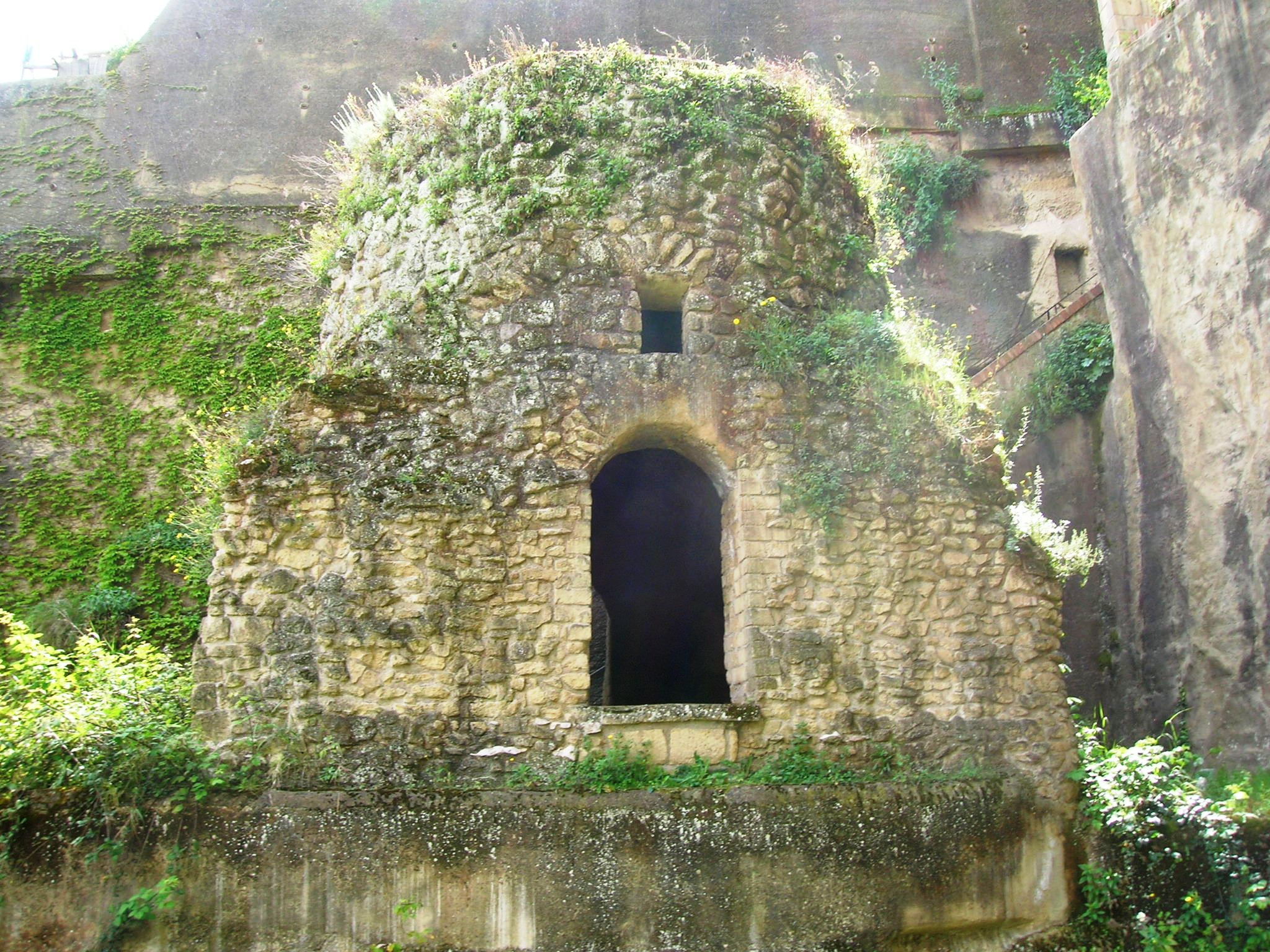 Tomba di Virgilio